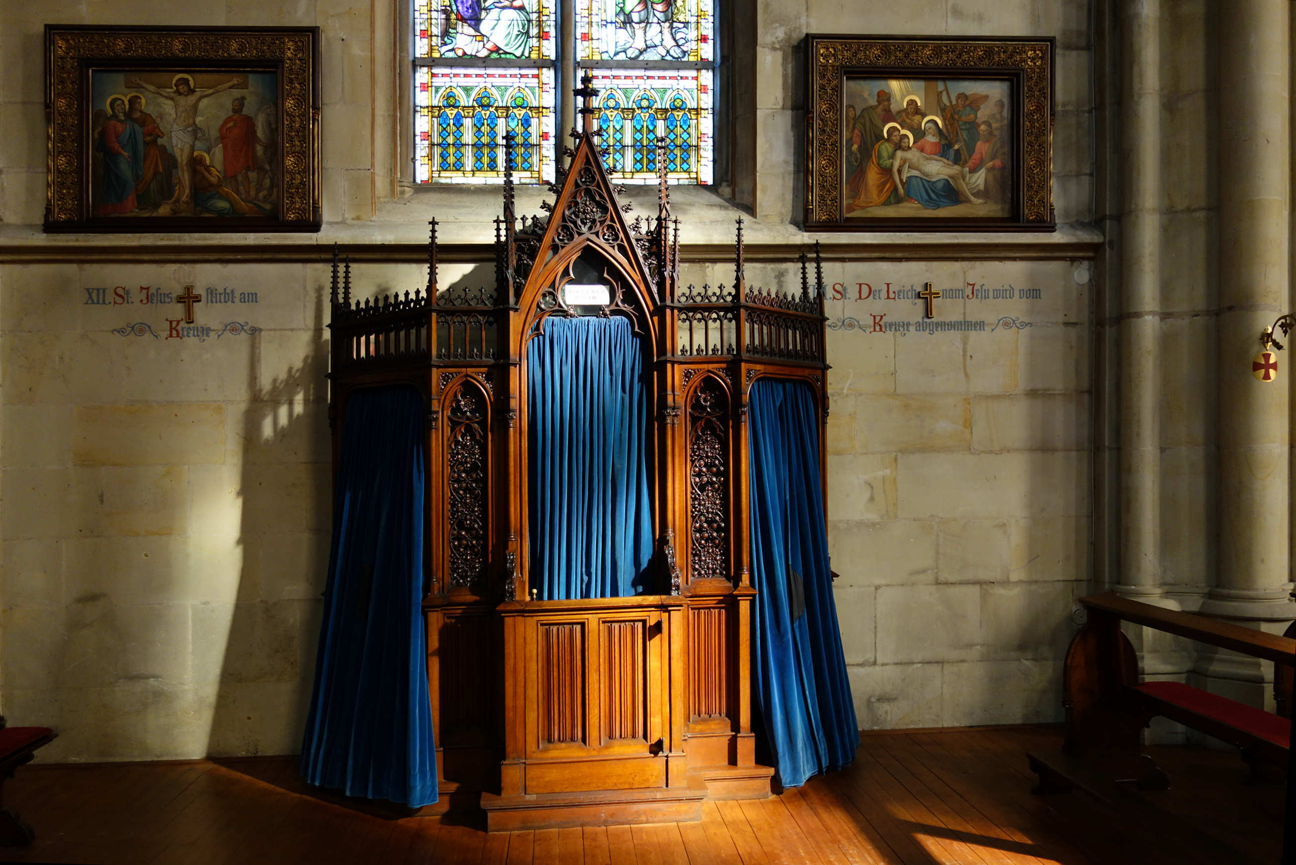 Beichtstuhl im Ludgerus-Dom, Billerbeck